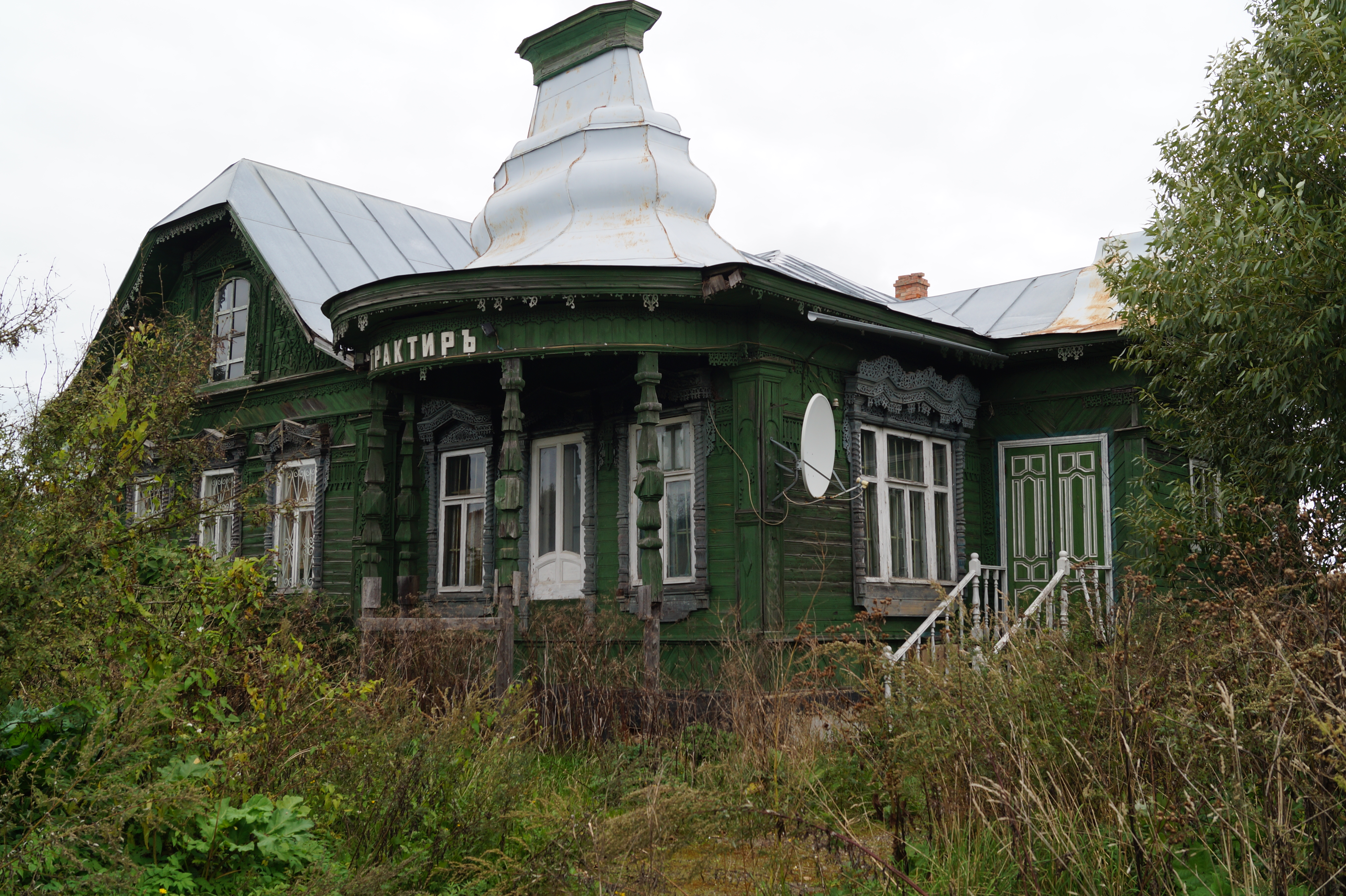 Усадьба Виноградова: Поречье, Калязинский район, Тверская область